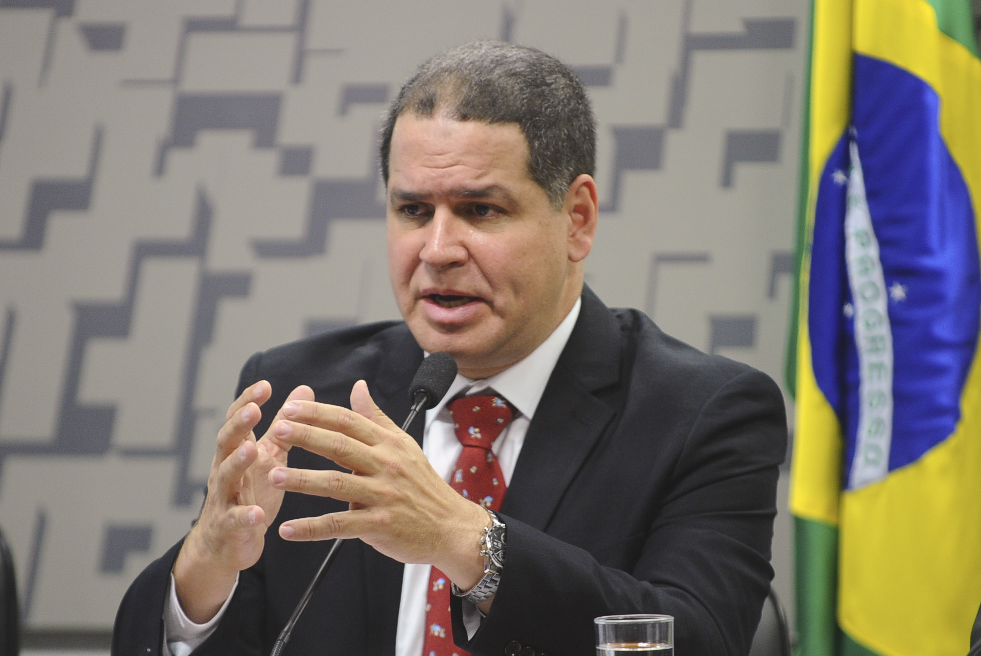 Comissão de Relações Exteriores e Defesa Nacional (CRE) realiza audiência para debater a situação política e econômica na Venezuela. Em pronunciamento, presidente da Comissão de Política Exterior, Soberania e Integração da Assembleia Nacional da República Bolivariana da Venezuela, deputado Luis Florido. Foto: Marcos Oliveira/Agência Senado